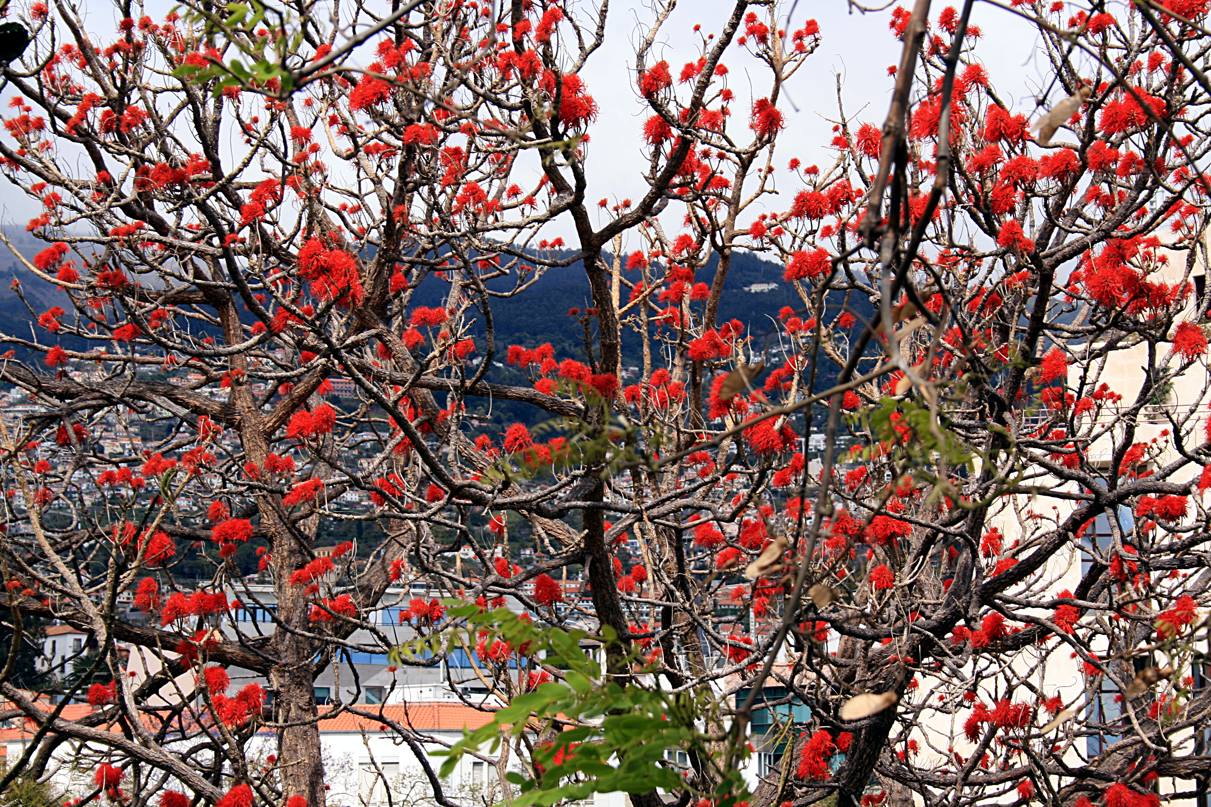 Funchal_-_Erythrina_abyssinica_(Korallenbaum)